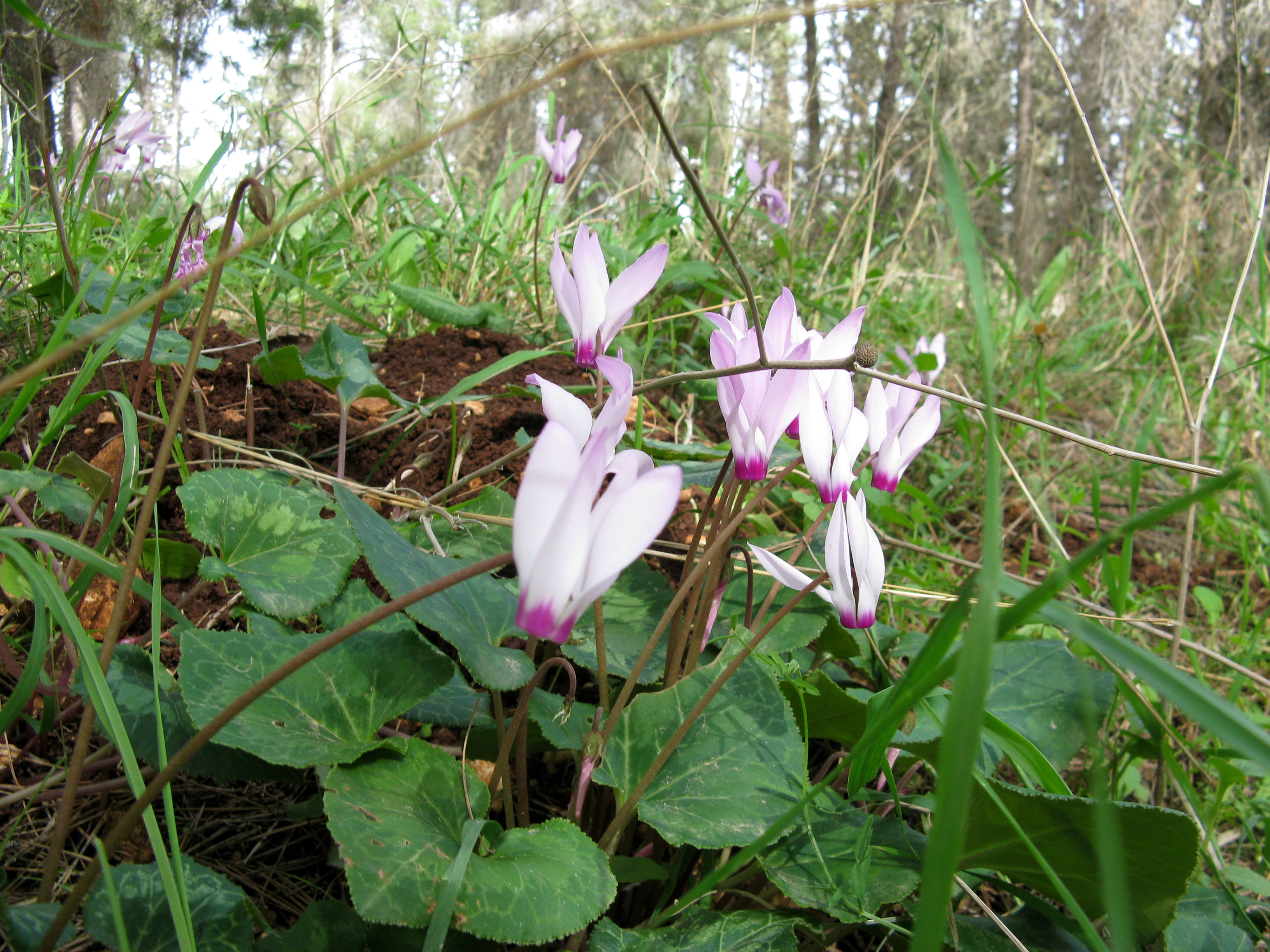 Дикий цикламен, Израиль